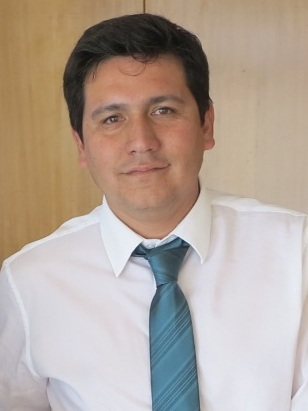 El encuentro se produjo en el Gabinete del Gobernador, hasta donde Prado Díaz llegó acompañado de investigadores y profesionales, que conforman el equipo base, como la abogada y experta en turismo Gloria Delucchi; además, María Isabel Fuente y Manuel Corvalán del área de la arquitectura; Cristian Dinamarca, Antropólogo Social y Guillermo Flores, del área jurídica. Mientras, otros investigadores como el arqueólogo Horacio Larraín, desarrollaban campañas de terreno, avanzando en la investigación. Estas localidades identificadas son 10, habiendo firmado el proceso de consulta, ya con 7 de ellas como, Miñe Miñe, Suca, Calatambo, Aroma, Quipisca, Tamentica y Huatacando, de acuerdo al Convenio 169 de la OIT, que establece la consulta ante cualquiera intervención, en tierras ancestrales, que constituyen un espacio y territorio indígena. (